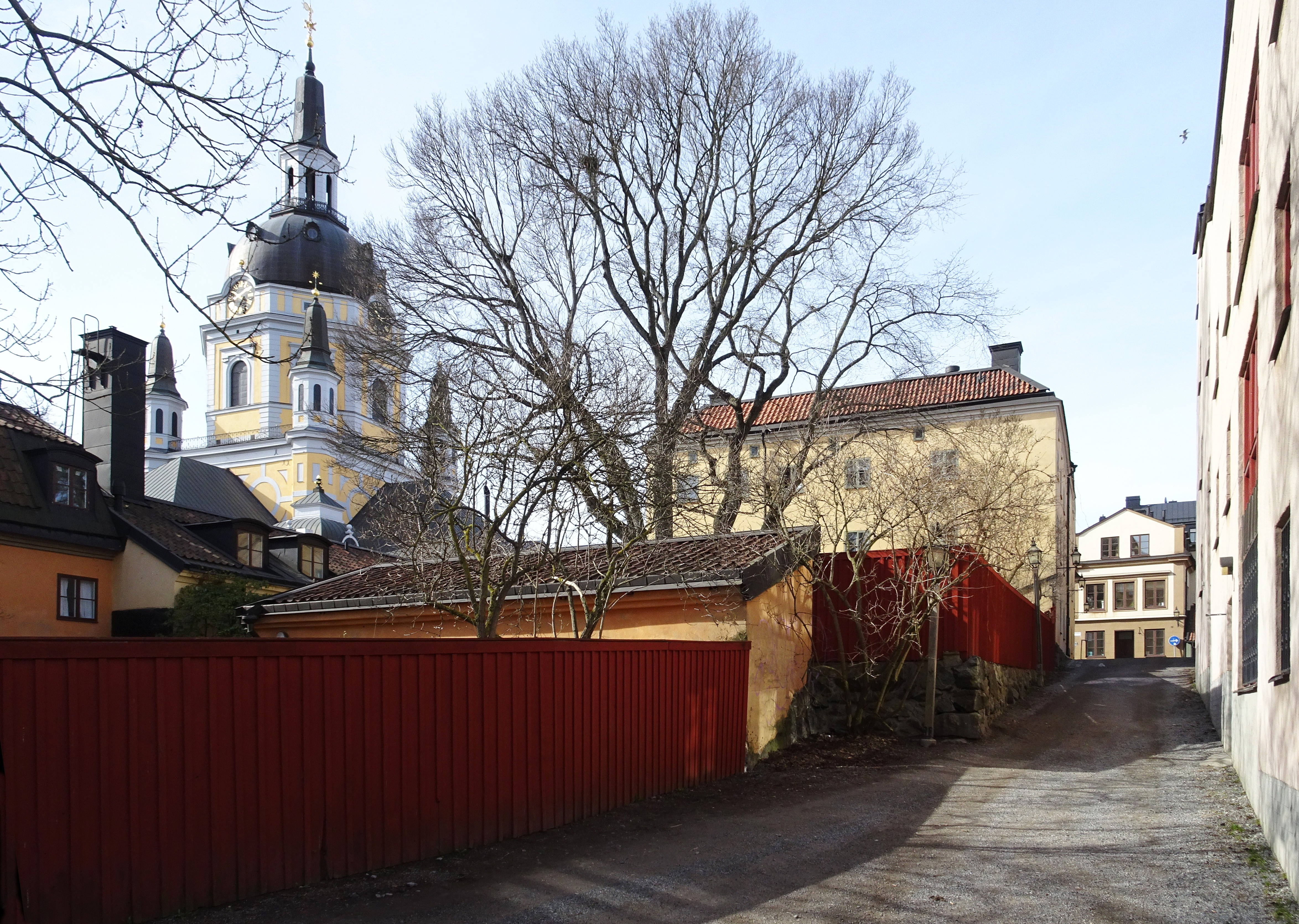 Fastigheten Drottningen 5, Södermalm, från Roddargatan